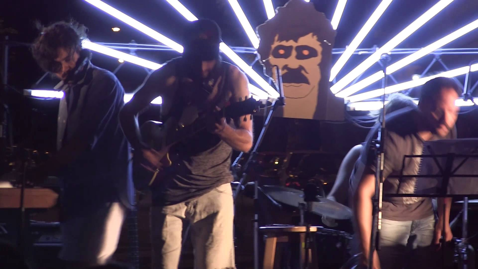 Fotograma extraído del video de la presentación de la banda "Ataque Chino" en la 5ª edición del festival de bandas independientes Peach and Convention, en diciembre de 2015.